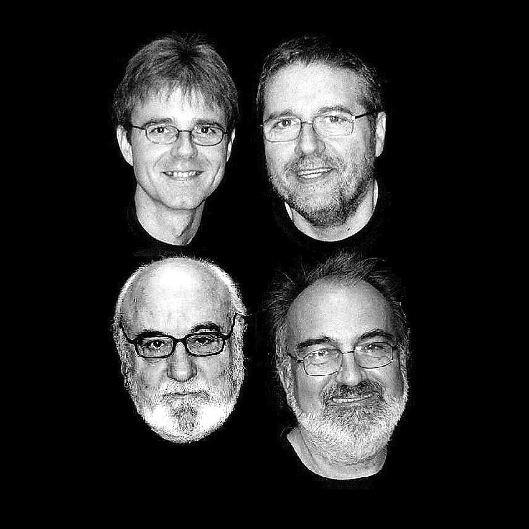 Radiokuartet